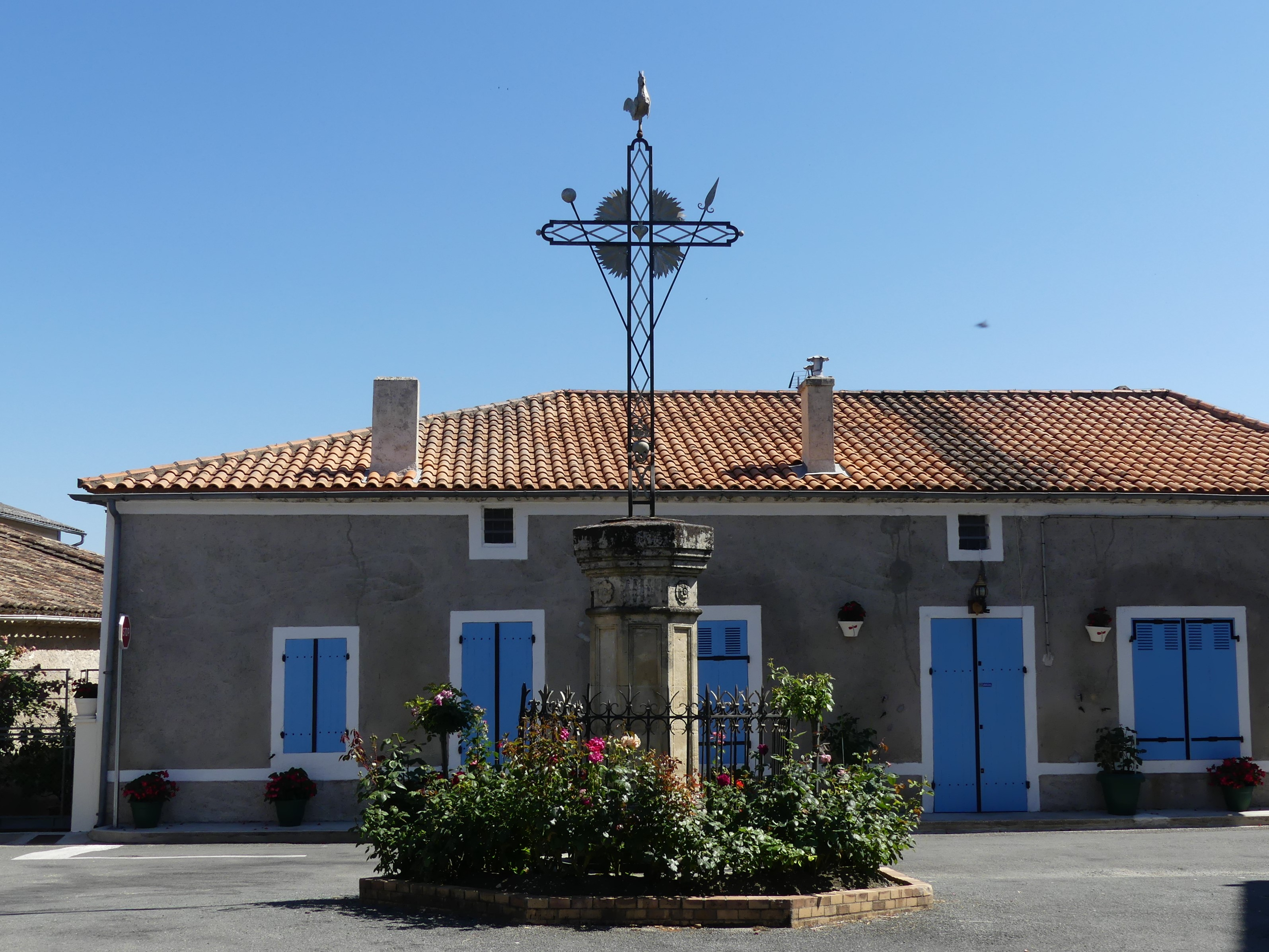 Croix située sur la place devant l'église, Castelnaud-de-Gratecambe, Lot-et-Garonne, France.